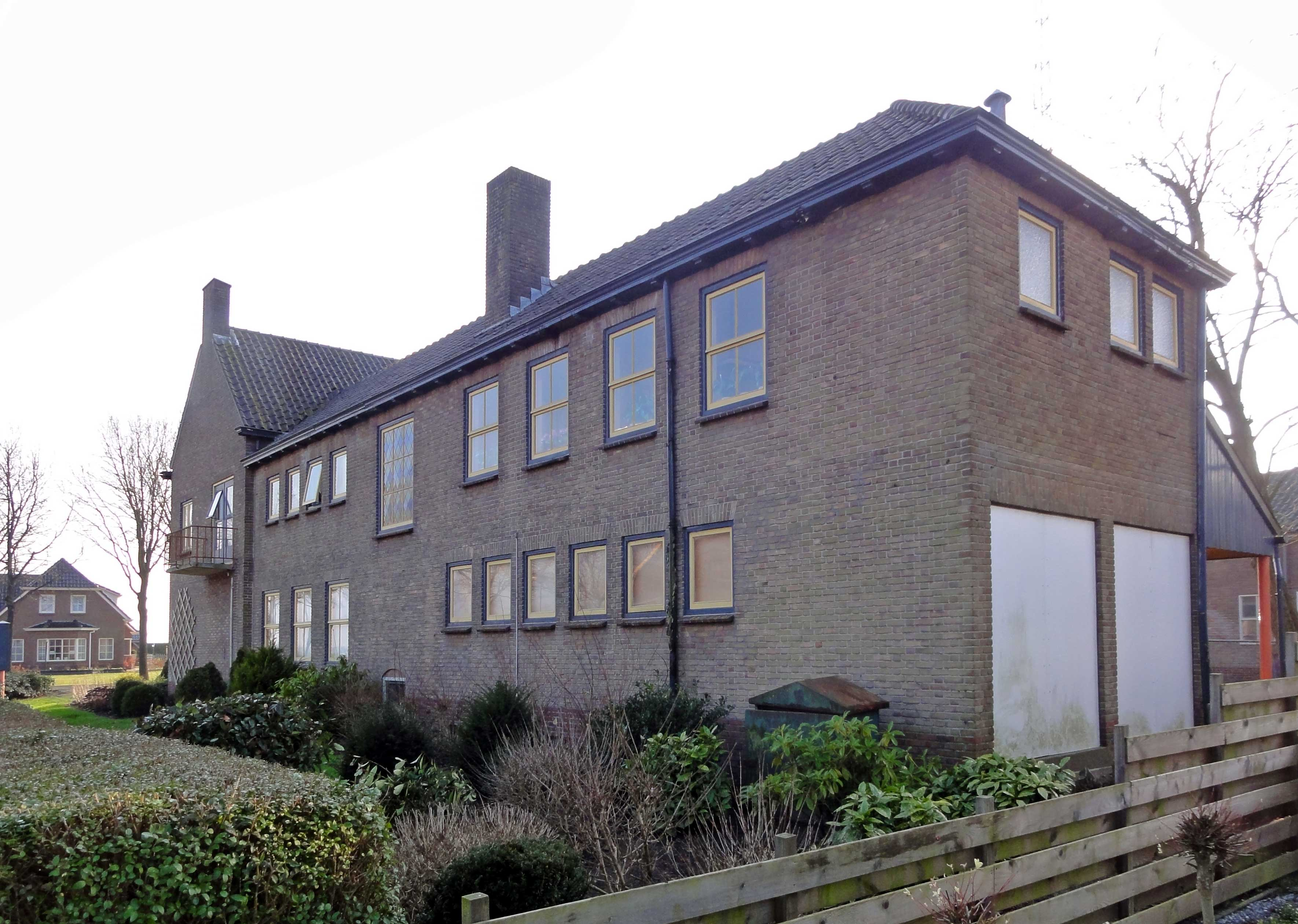 Voormalig Groene Kruisgebouw annex brandweerkazerne Tweede Exloërmond, provinciaal monument